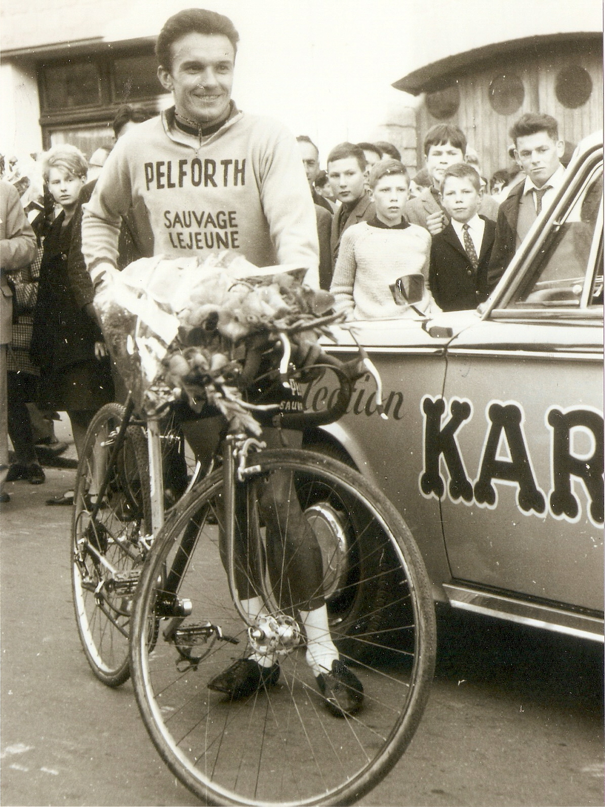 Course de cyclo-cross à Vimoutiers, 1965